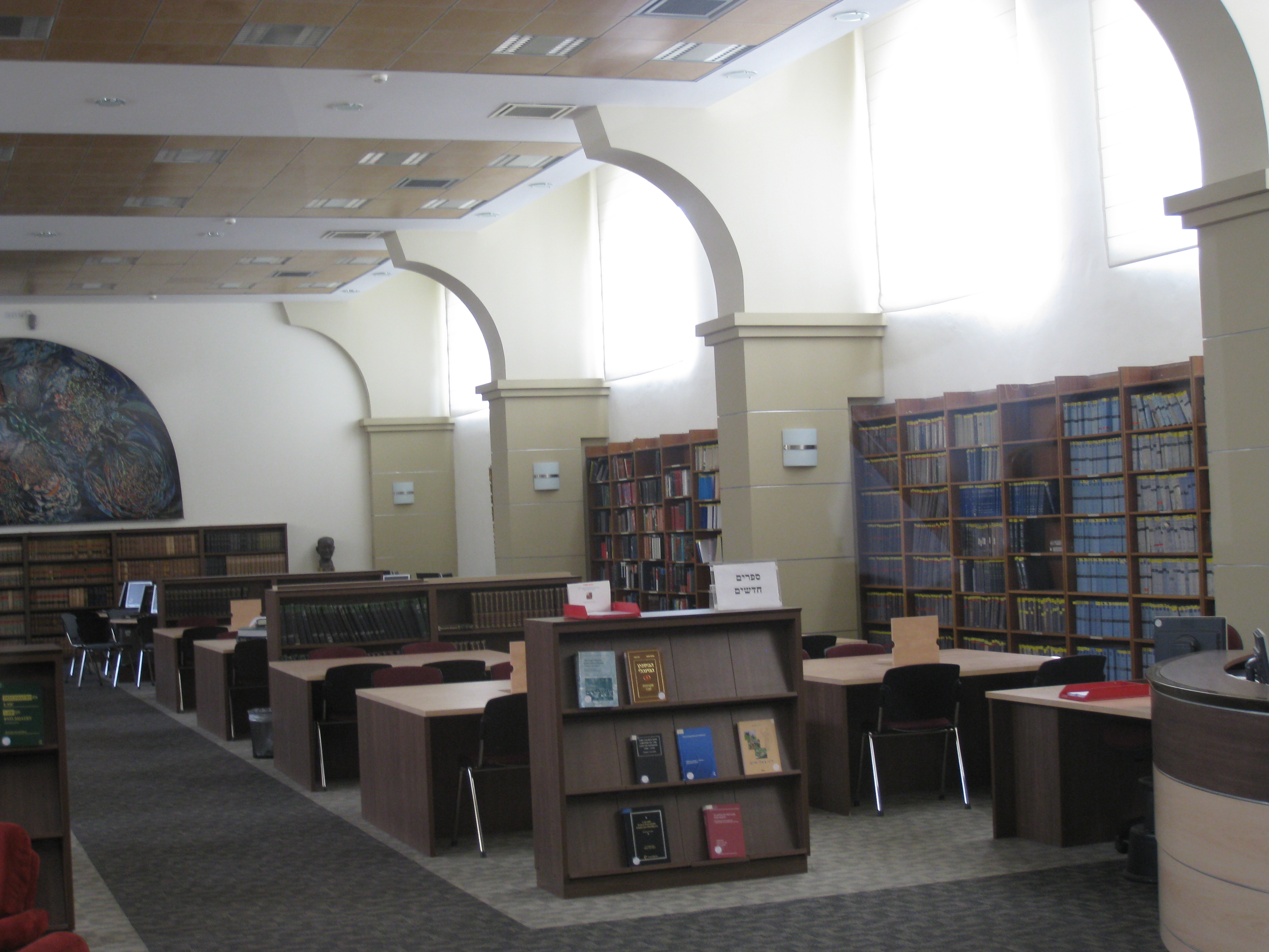 Mount Scopus הר הצופים